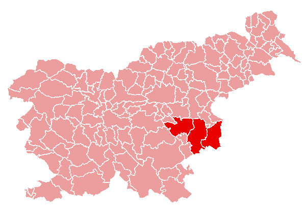 Posavske občine, od zahoda proti vzhodu: Sevnica, Krško, Brežice. Izdelal Uporabnik:Romanm po predlogi Plp Kategorija:Zemljevidi Slovenije